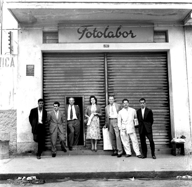 Obra que integra o acervo do Museu Paulista da USP. Coleção Werner Haberkorn